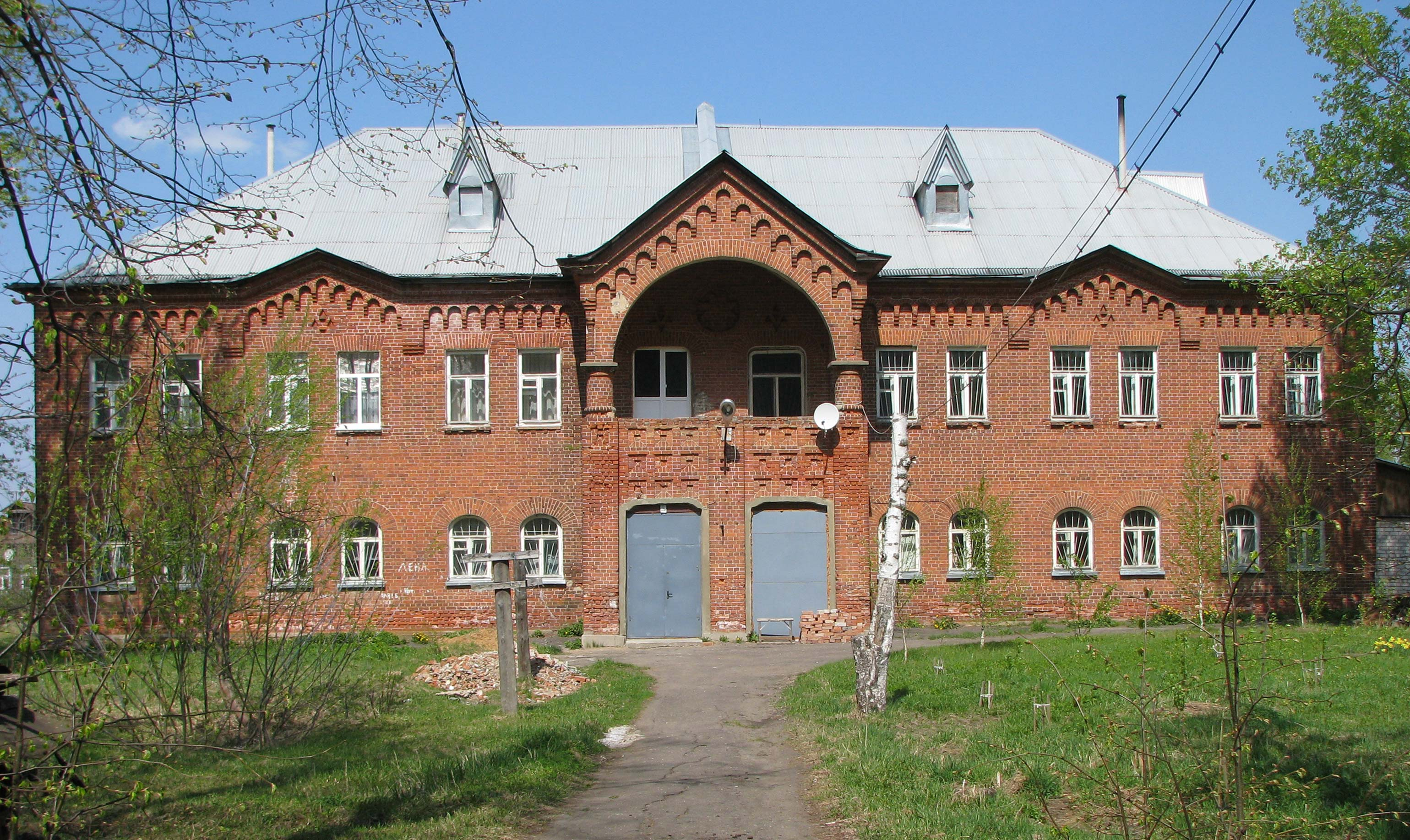 Красная церковь в Вичуге. Дом причта. Общий вид